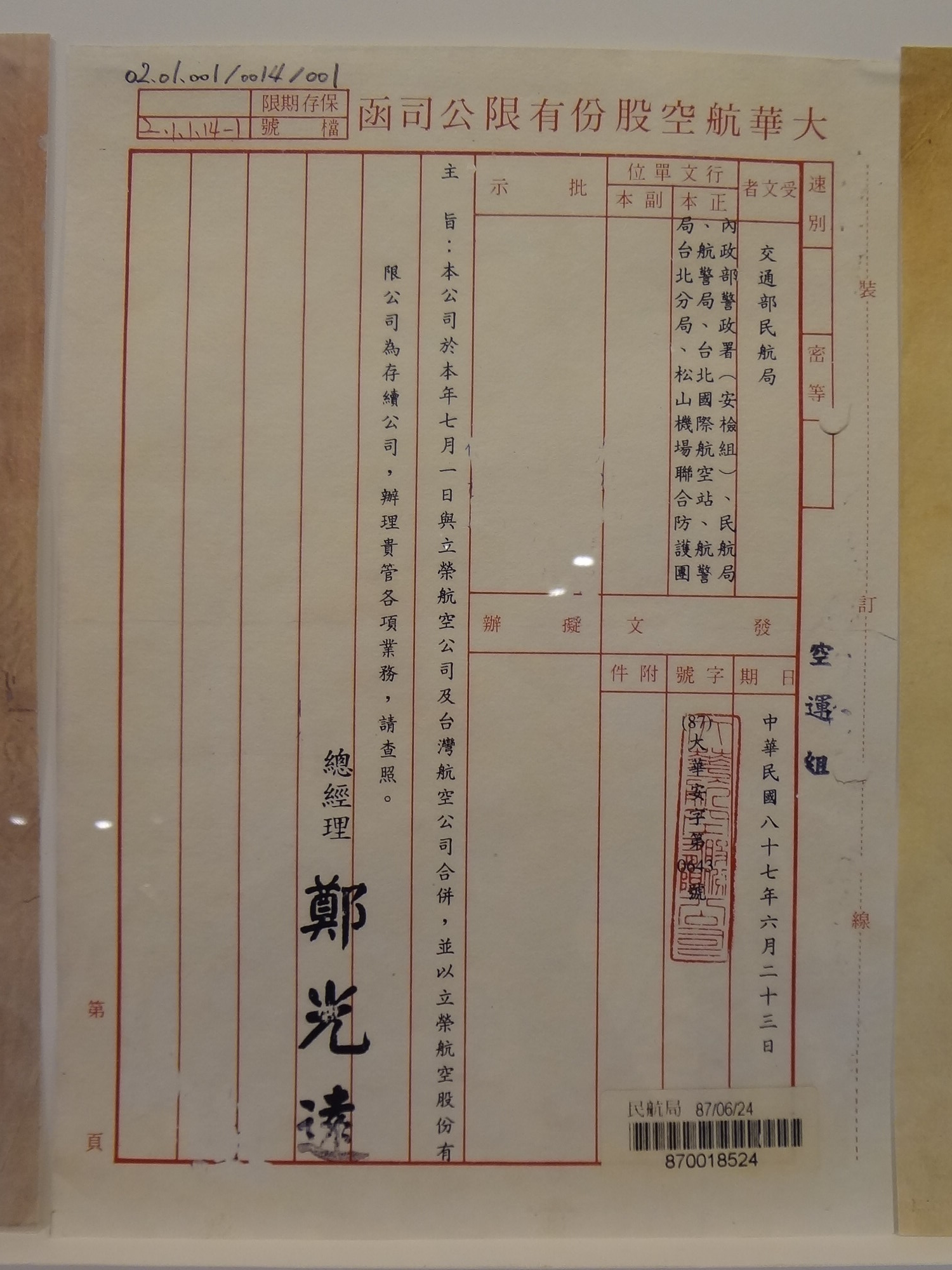 1998年（中華民國87年）6月23日，大華航空總經理鄭光遠發給中華民國交通部民用航空局的公文，說明本年7月1日該公司與立榮航空及臺灣航空合併，合併後以立榮航空為存續公司。